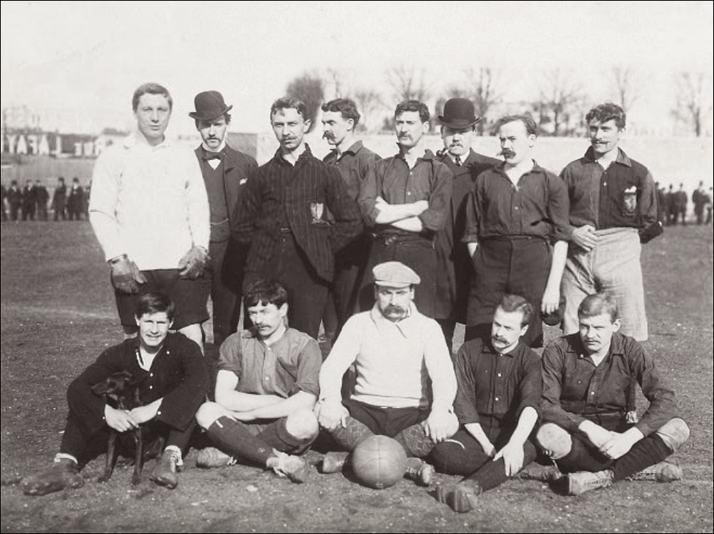 16 mars 1902 à Levallois-Perret, finale de la Coupe Dewar entre le Standard Athletic Club et l'United Sports Club - équipe du Standard AC